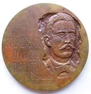 Medal z brązu 3 Pomorskiej Dywizji Piechoty; rewers